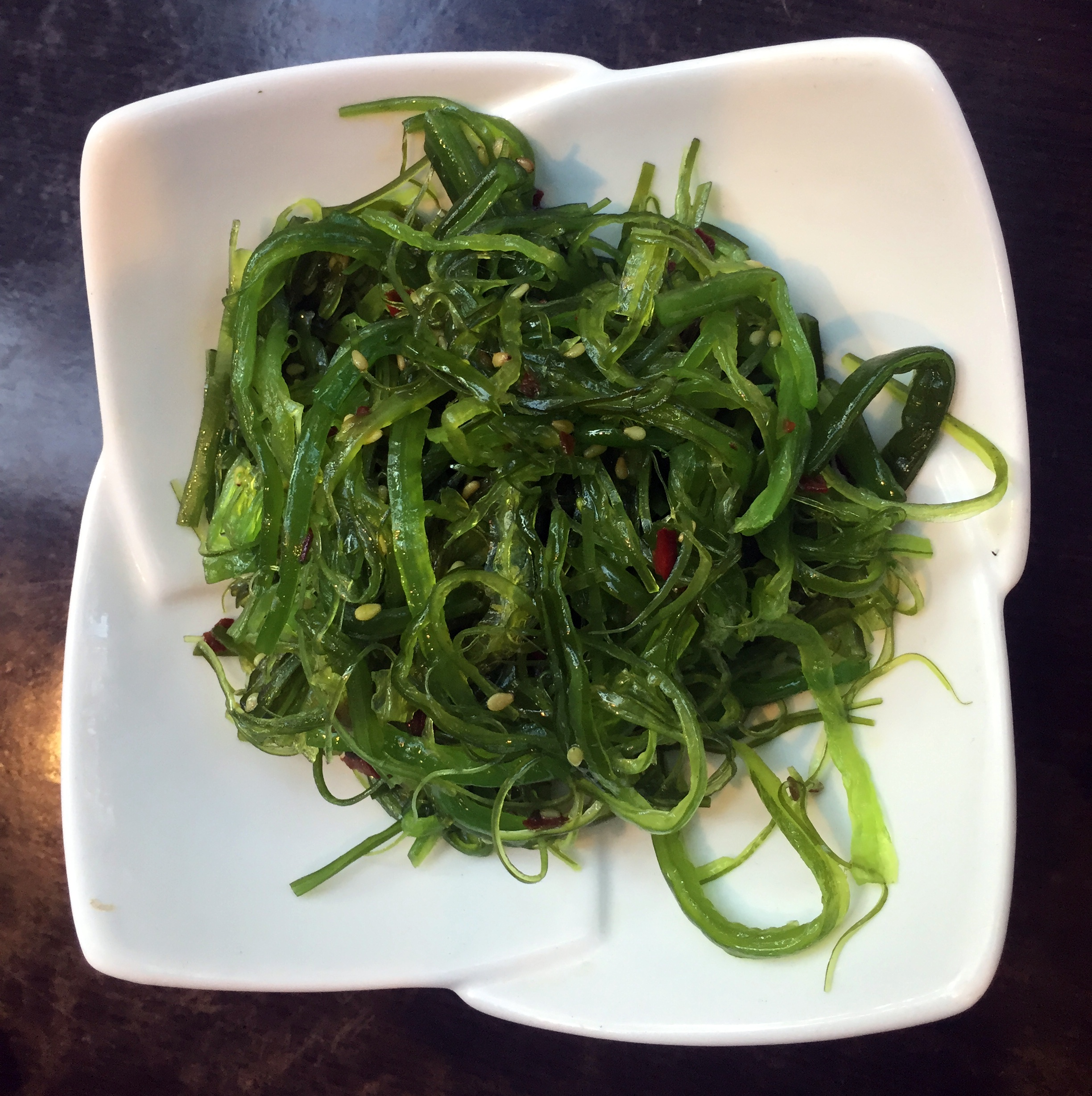 Salade wakame (Paris).